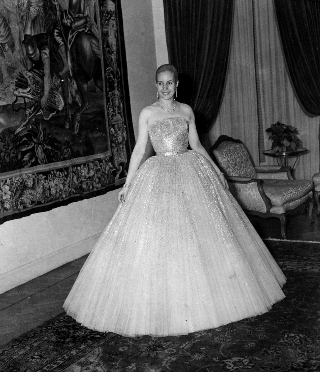 Eva Perón vestida de gala para una función en el Teatro Colón, 1949. Inventario 244880. General Archive of the Nation Native nameArchivo General de la Nación ArgentinaLocationBuenos Aires, ArgentinaCoordinates34° 36′ 17″ S, 58° 22′ 14″ W Established28 August 1821Web pageAGNAuthority control : Q2860529 ISNI: 0000 0001 2375 5869 LCCN: n82144709 WorldCat institution QS:P195,Q2860529 This file, was provided to Wikimedia Commonsthanks to an agreement between the General Archive of the Nation of Argentina and Wikimedia Argentina.